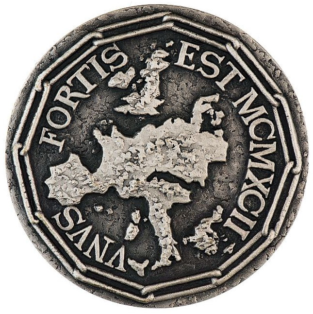 Gedenkpenning ter gelegenheid van het Verdrag van Maastricht (1992) met de 12 toenmalige lidstaten van de Europese Unie. Voorzijde: plattegrond van het Europa van de twaalf, omgeven door tekst "UNUS FORTIS EST MCMXCII" en een rand van twaalf schakels. Keerzijde: naakte Europa op de rug gezien, te midden van bloemen en takken, in krans van twaalf vijfpuntige sterren, met palmtak in rechterhand, en opschrift "EUR / OPA". Ontwerp/productie: Willem Verbon (1921-2003). Doorsnede: 5 cm. Collectie: Museum Rotterdam, ref.nr. 76715.